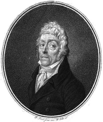 Frontispiz der Autobiografie von Joseph Lange. Bildunterschrift: „F. Lieder pinx. 1808. F. John sc.“